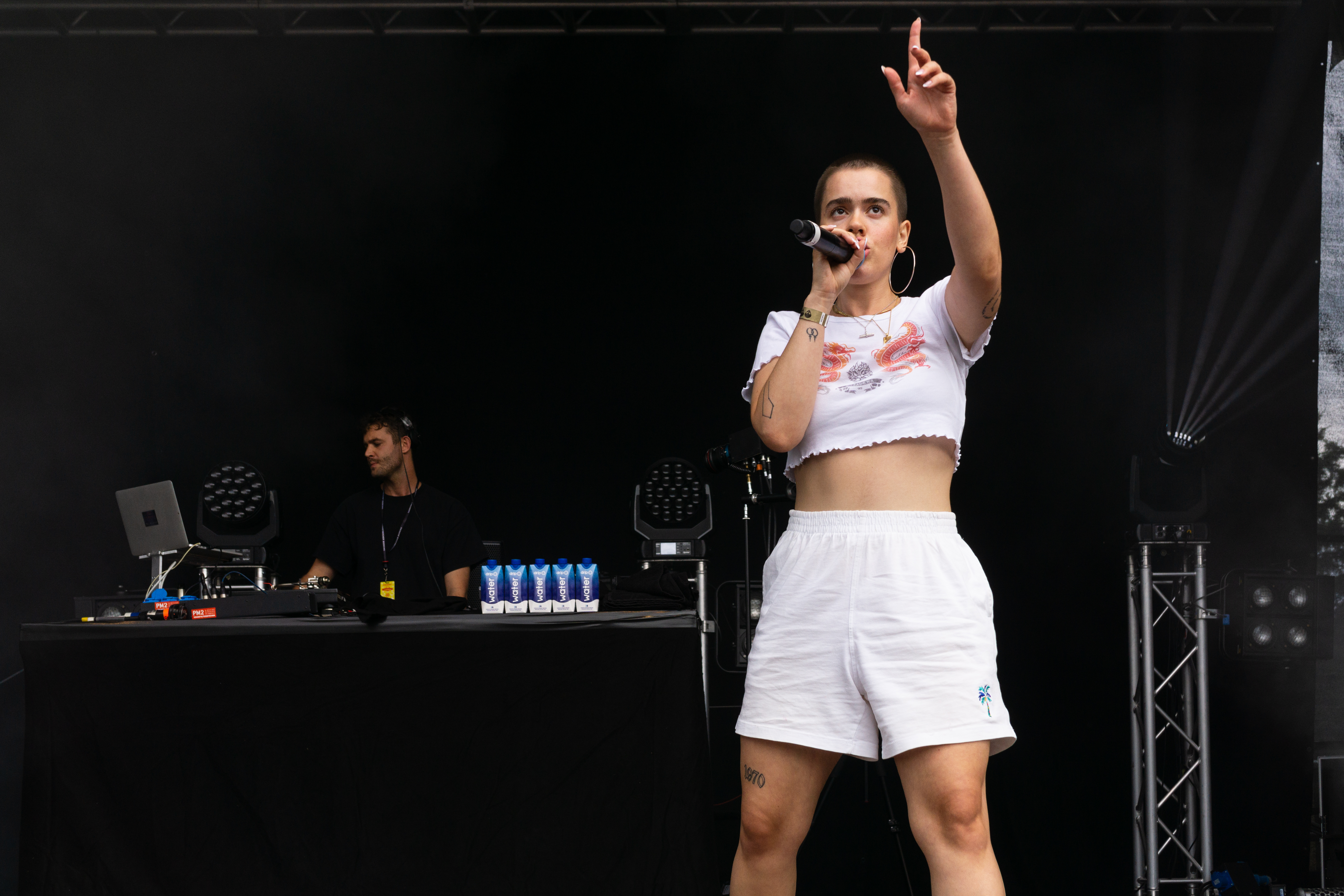 Musikfestival in Chemnitz.